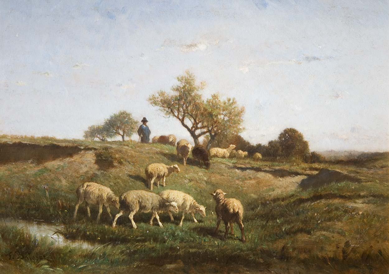 "Hirt und Schafherde in Weidelandschaft"